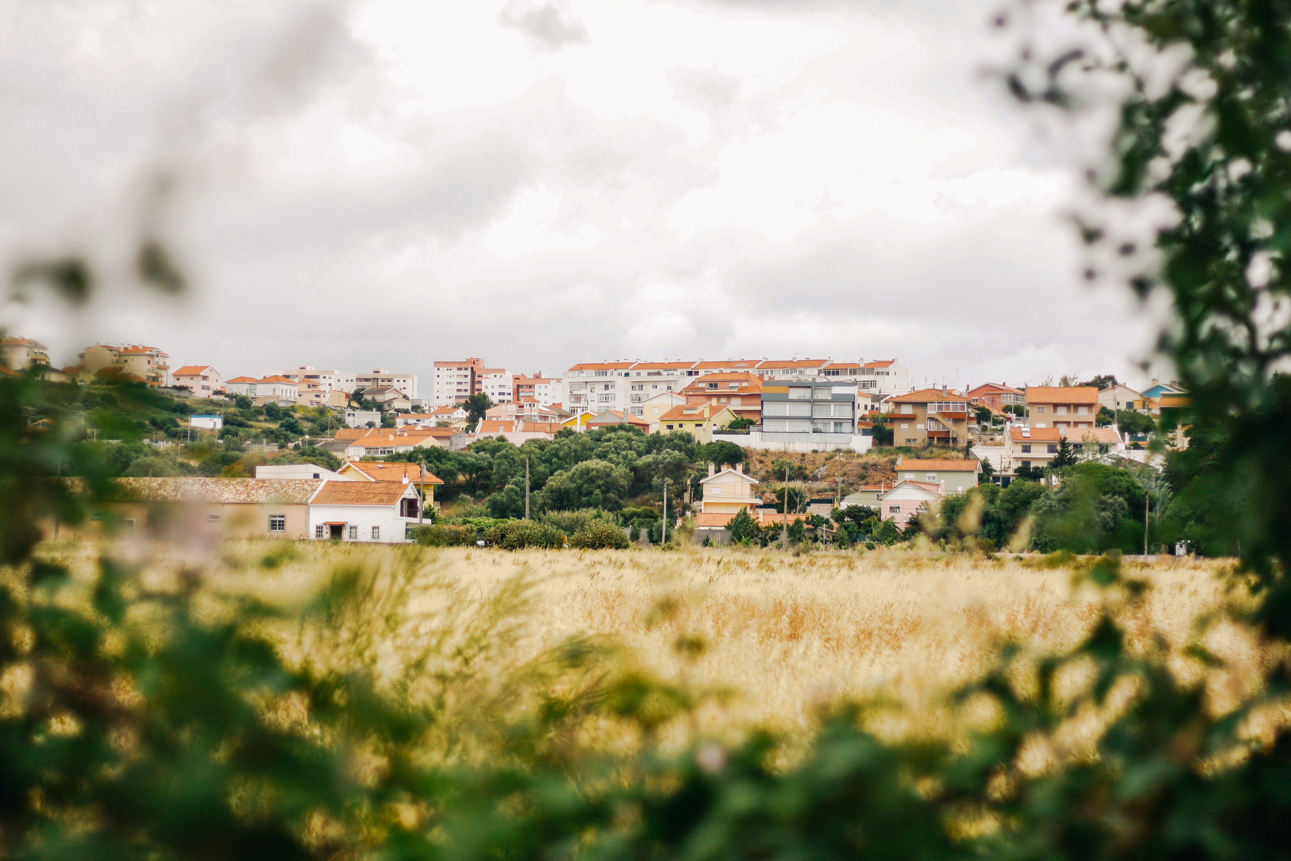 Penedo visto da Rua Doutor Mário Amaral.